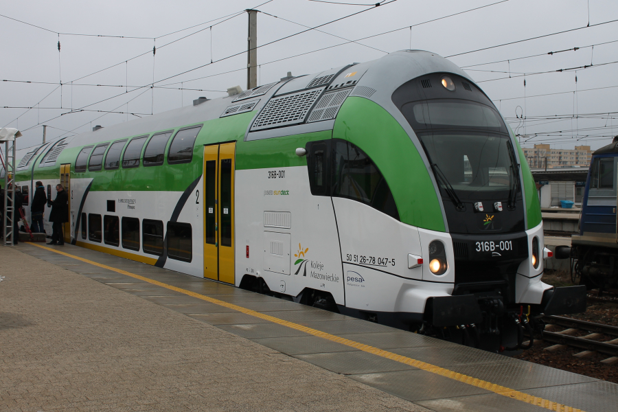 Piętrowy wagon sterowniczy Pesa Sundeck 316B-001 stoi przy peronie 5 stacji Warszawa Wschodnia podczas uroczystego przekazania Kolejom Mazowieckim pociągów push-pull wyprodukowanych przez Pesę Bydgoszcz.